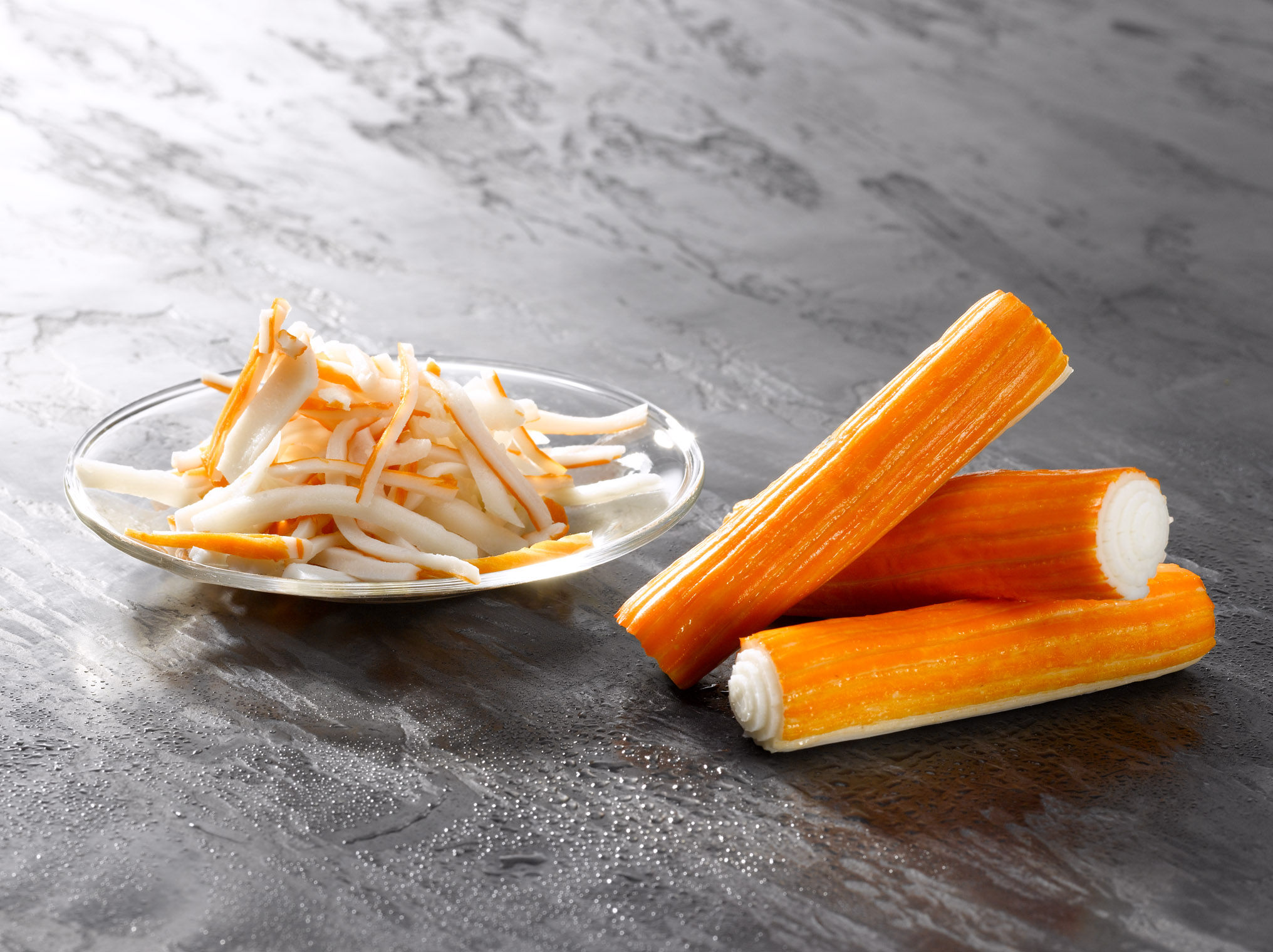 En bâtonnet, en miettes ou râpé, le surimi se prête à de nombreuses recettes